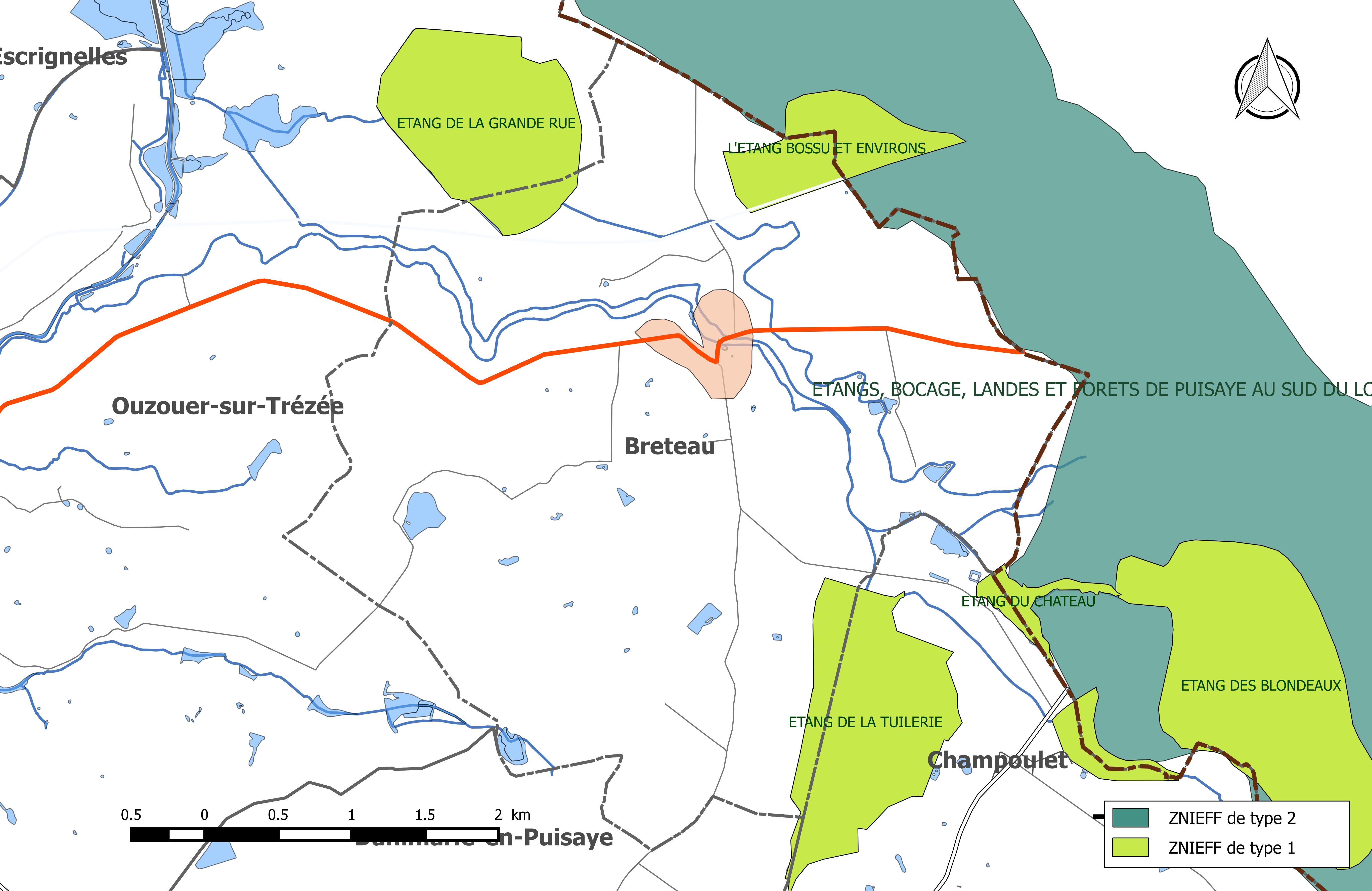 Carte des Zones naturelles d'intérêt écologique faunistique et Floristique (ZNIEFF) de la commune de Breteau.